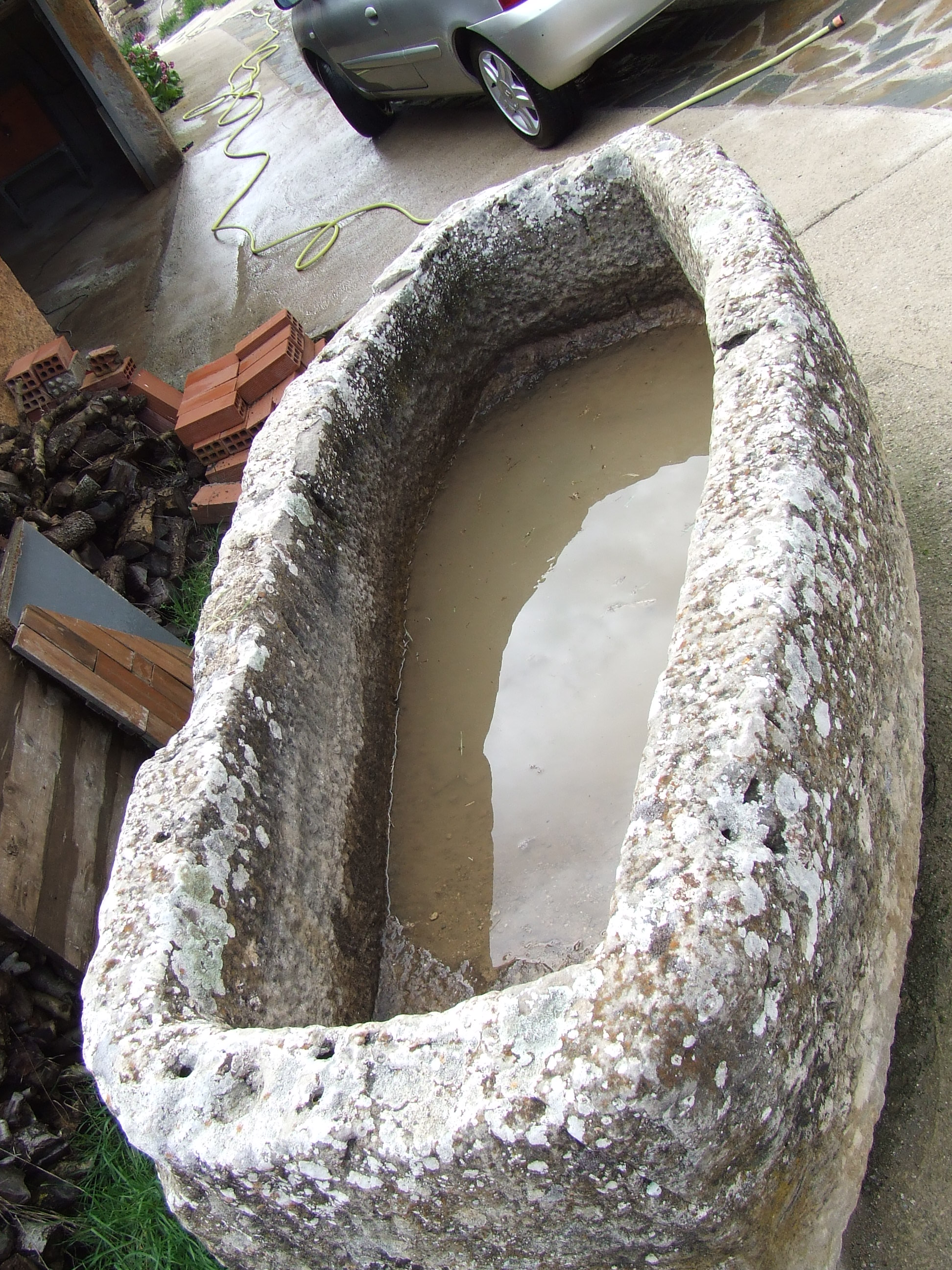 Tomba antropomòrfica medieval al carrer d'Alsamora (Sant Esteve de la Sarga, Pallars Jussà)